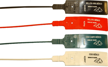 4 diferentes calidades del jamón ibérico